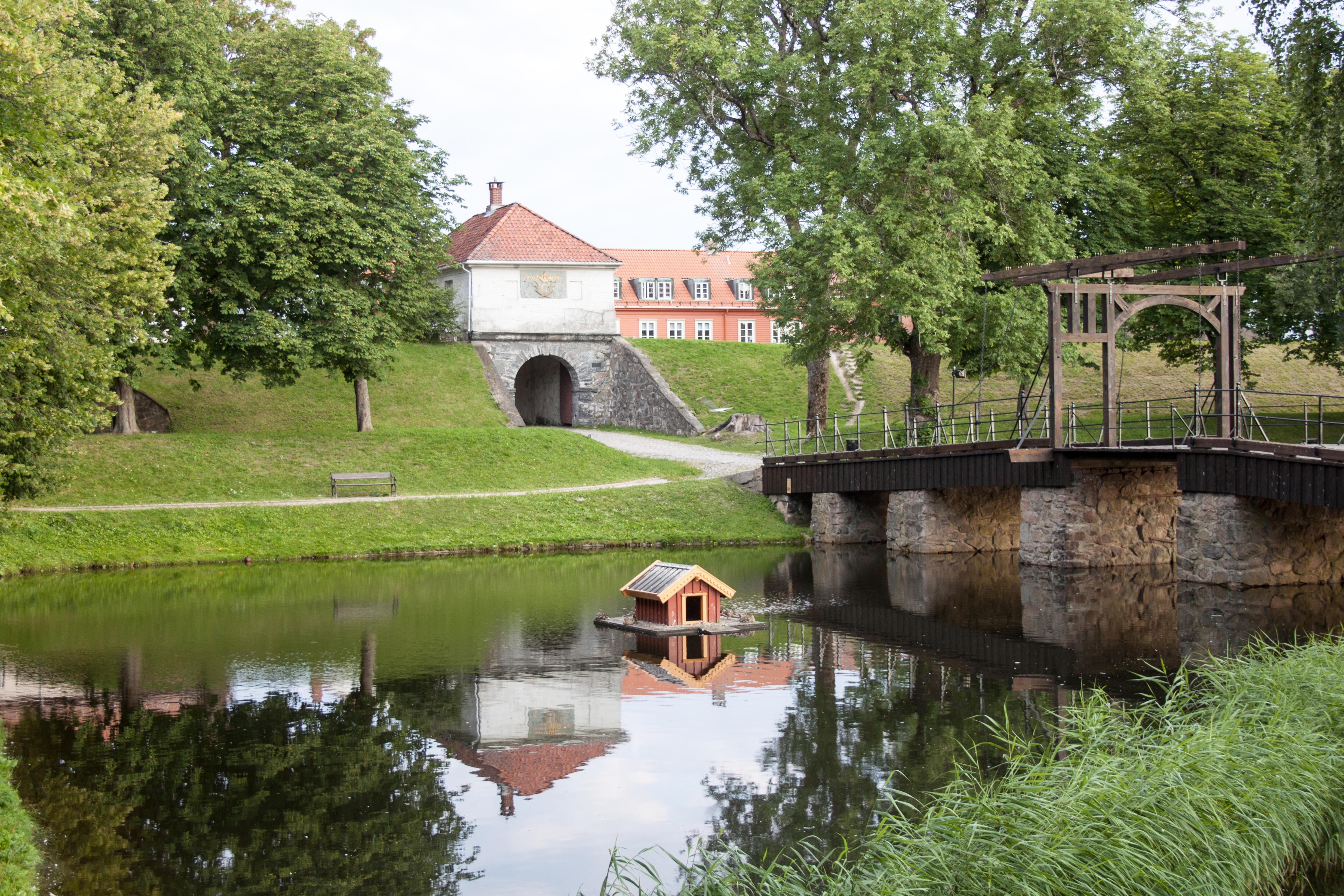 Fredrikstad fortress